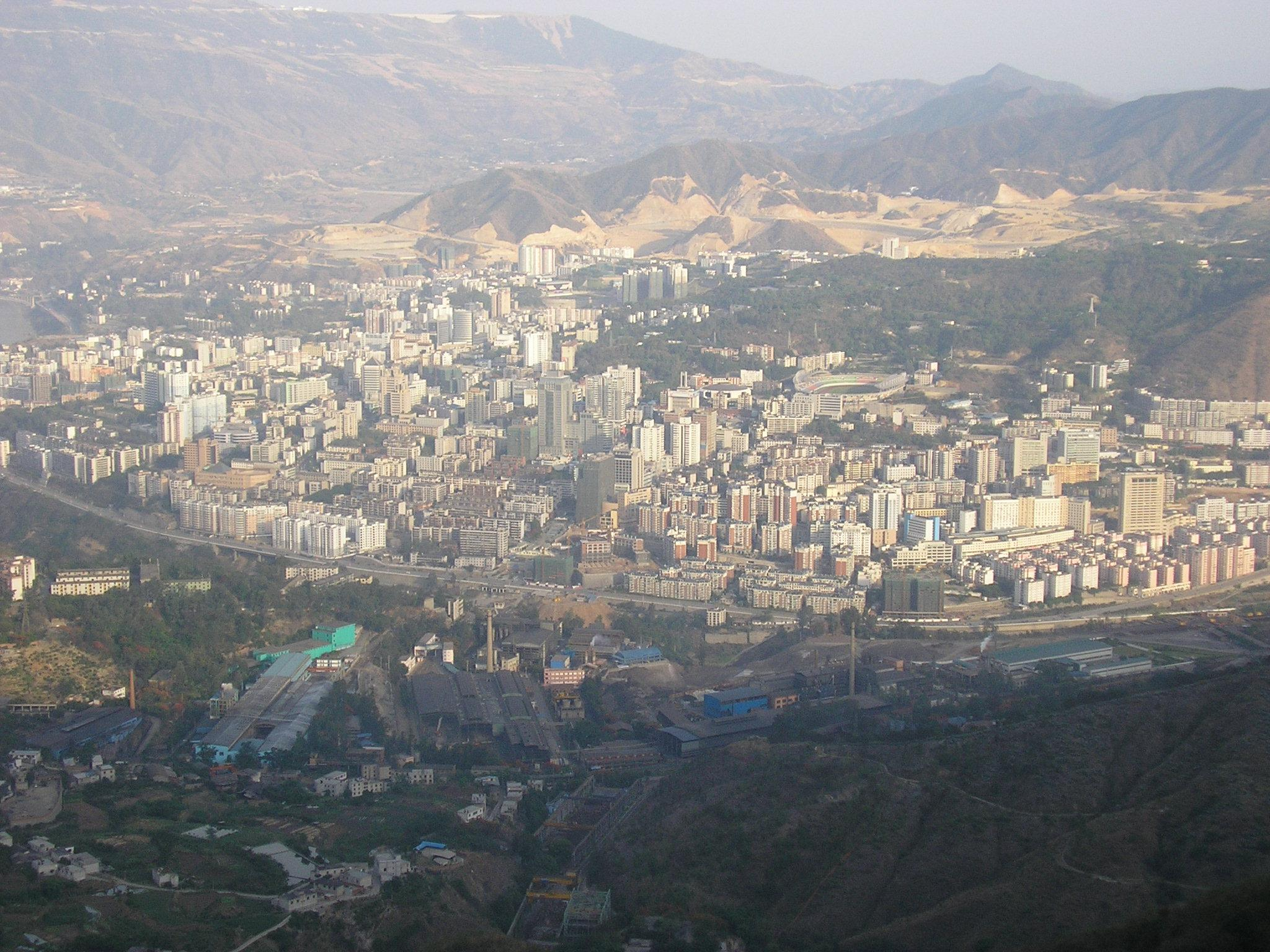 攀枝花市中心全图（炳草岗）chaselei